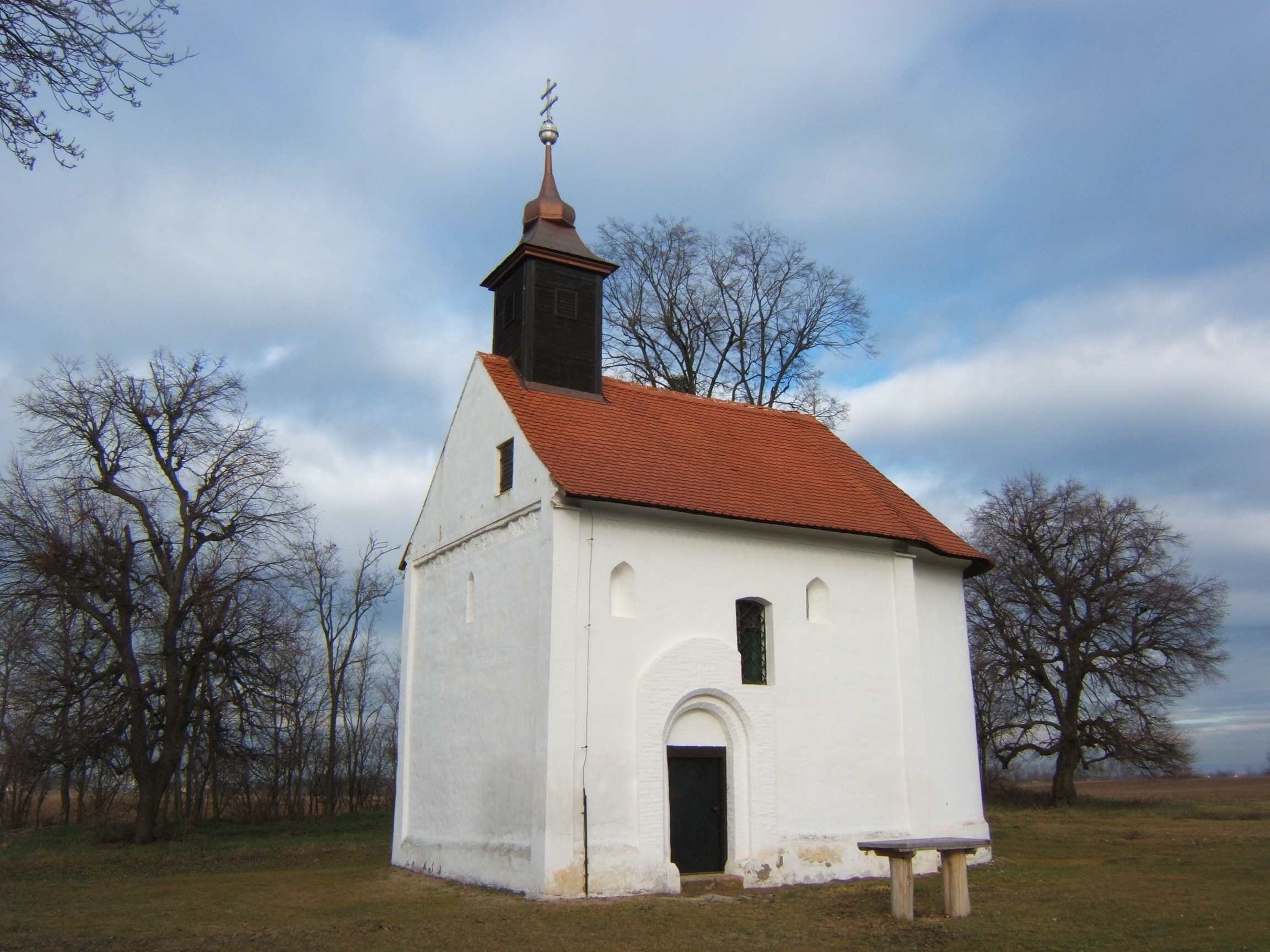 Buzsák, kápolna